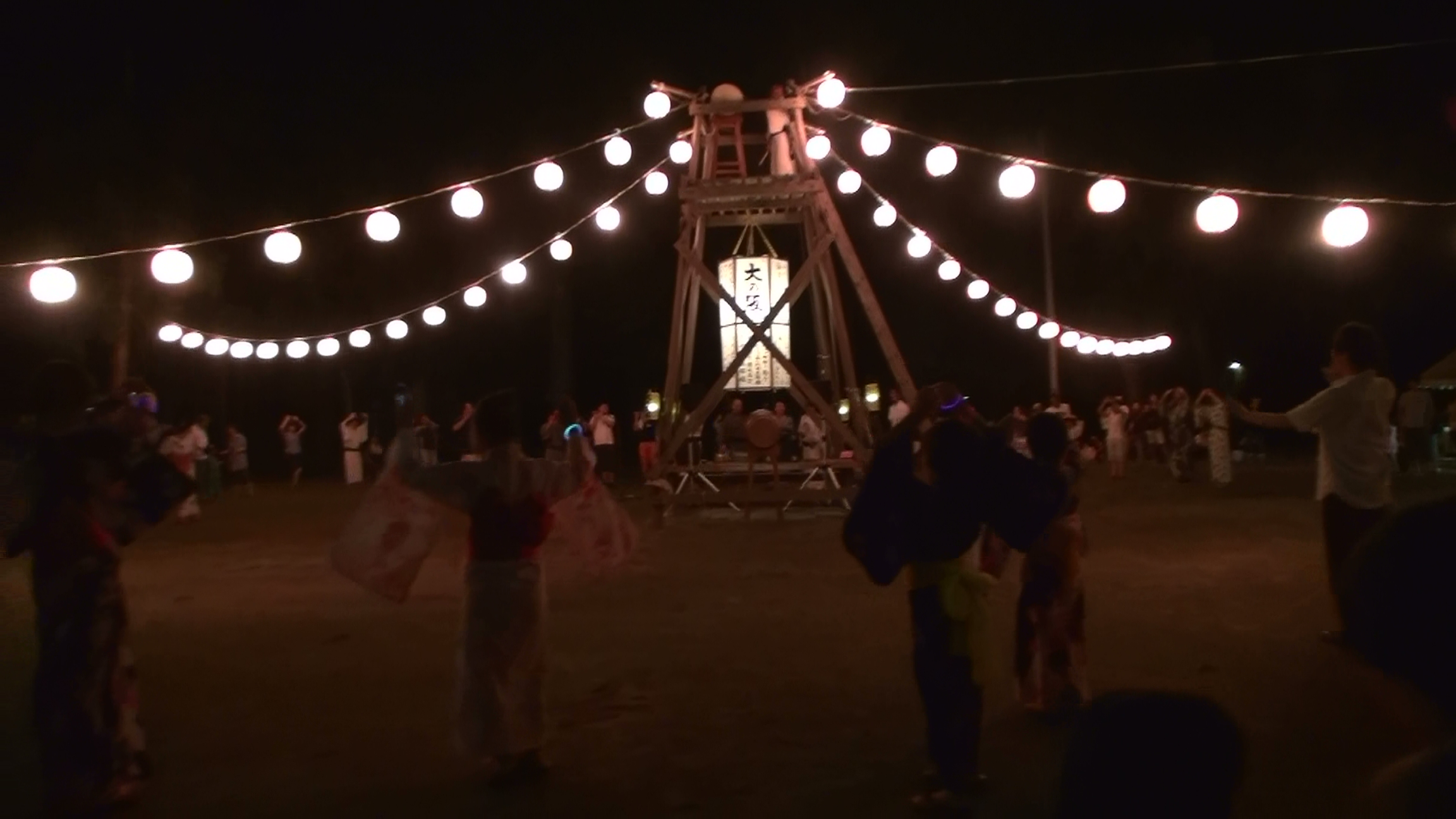 大の阪（新潟県魚沼市）